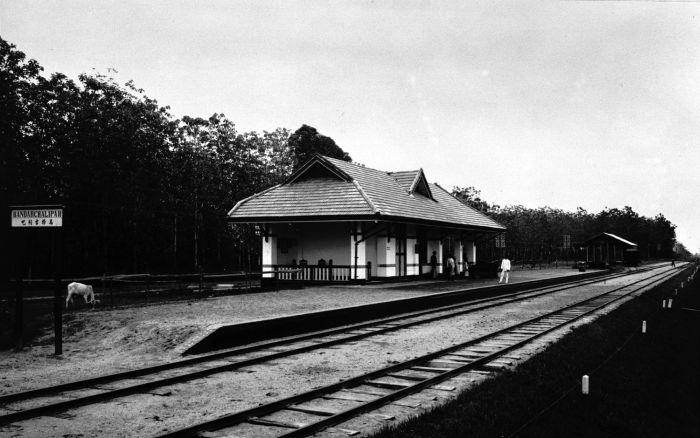 Foto. Het station van Bandarchalipah, oostkust Sumatra